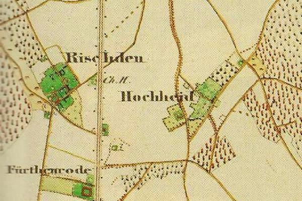 Preußische Kartenaufnahme 1846 - Uraufnahme - (5002 Geilenkirchen)